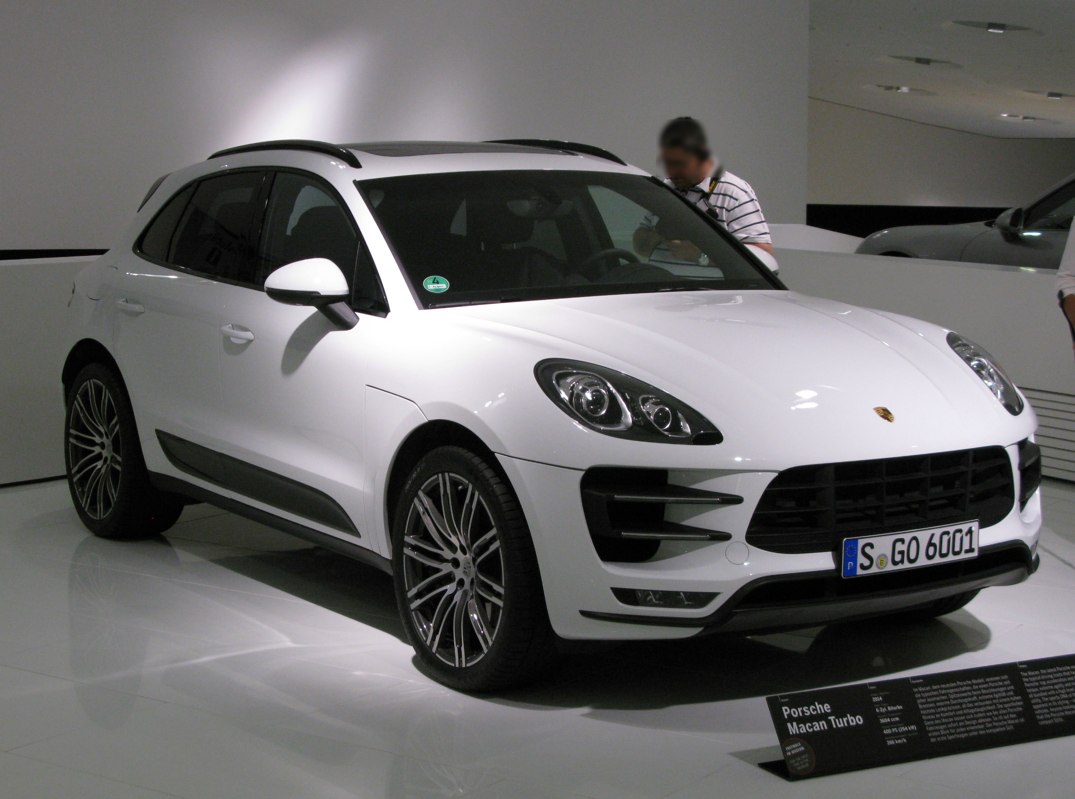 Porsche Macan Turbo